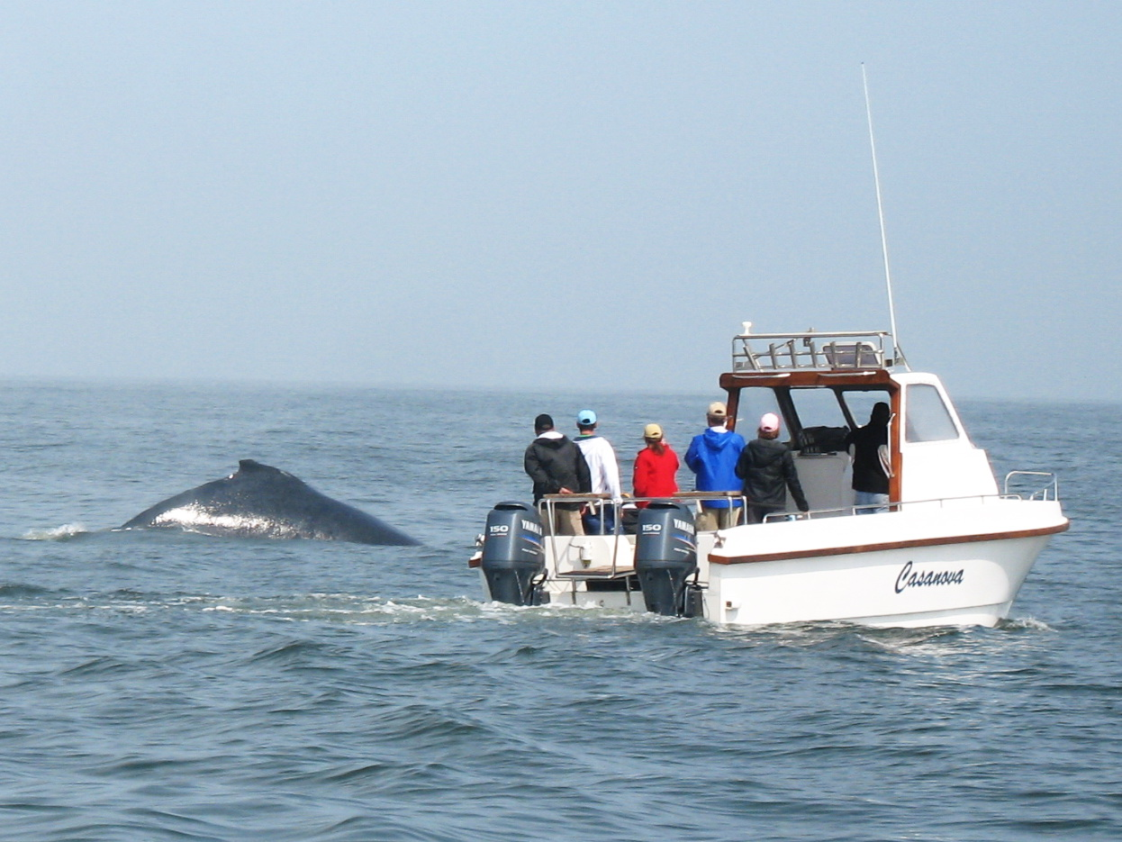 Walbeobachtung in der Bucht von Walvis Bay